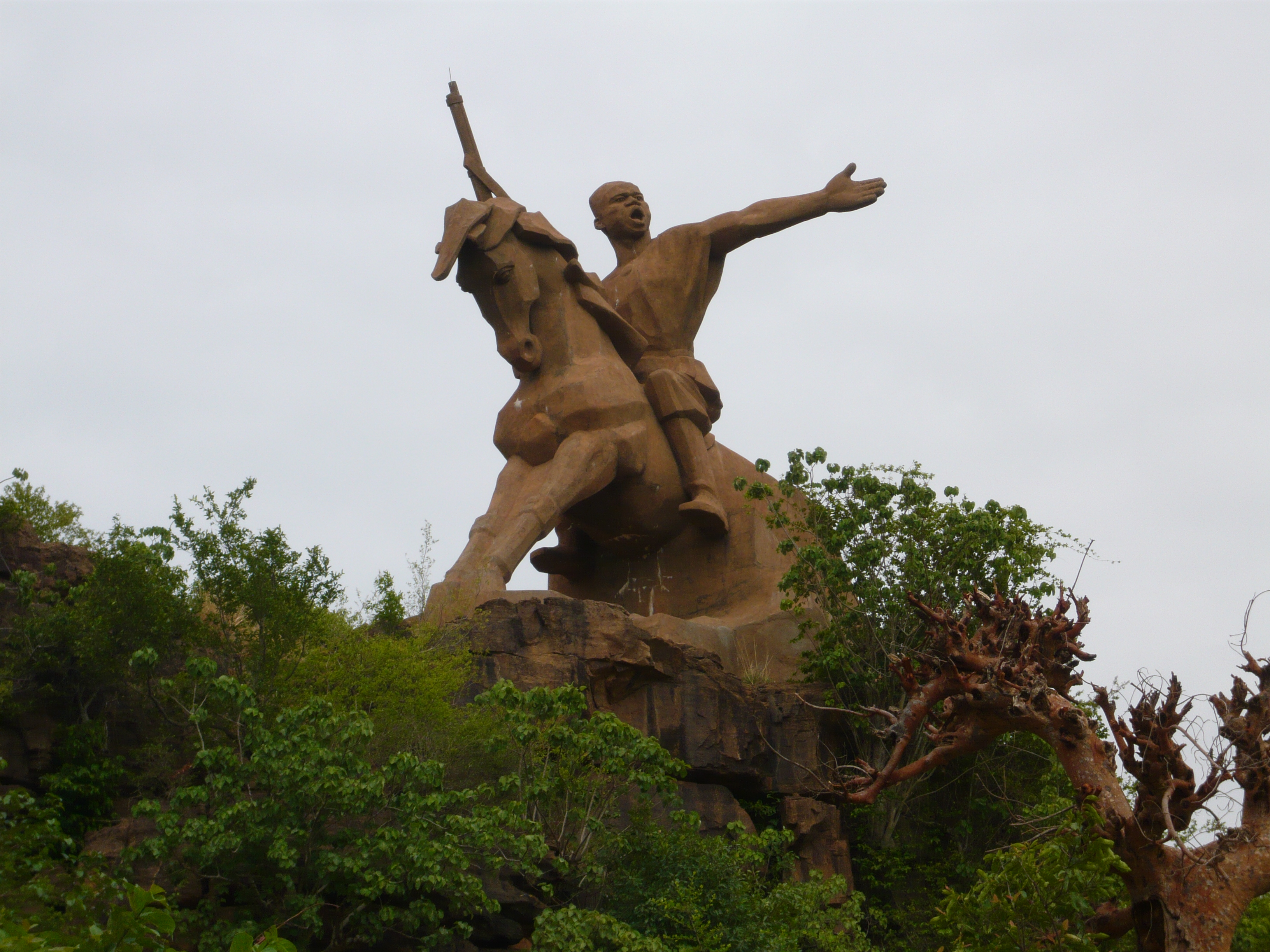 Sofa de Samory-Woyowoyanko, Konianbougou - Bamako, Mali